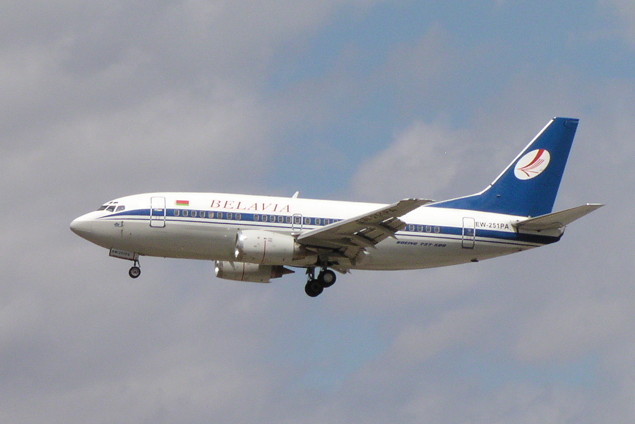 Belavia Boeing 737-500 (EW-251PA) in Frankfurt/Main (EDDF)